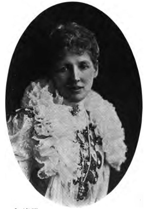 ヒュー・フレイザー駐日英国公使の妻メイリー